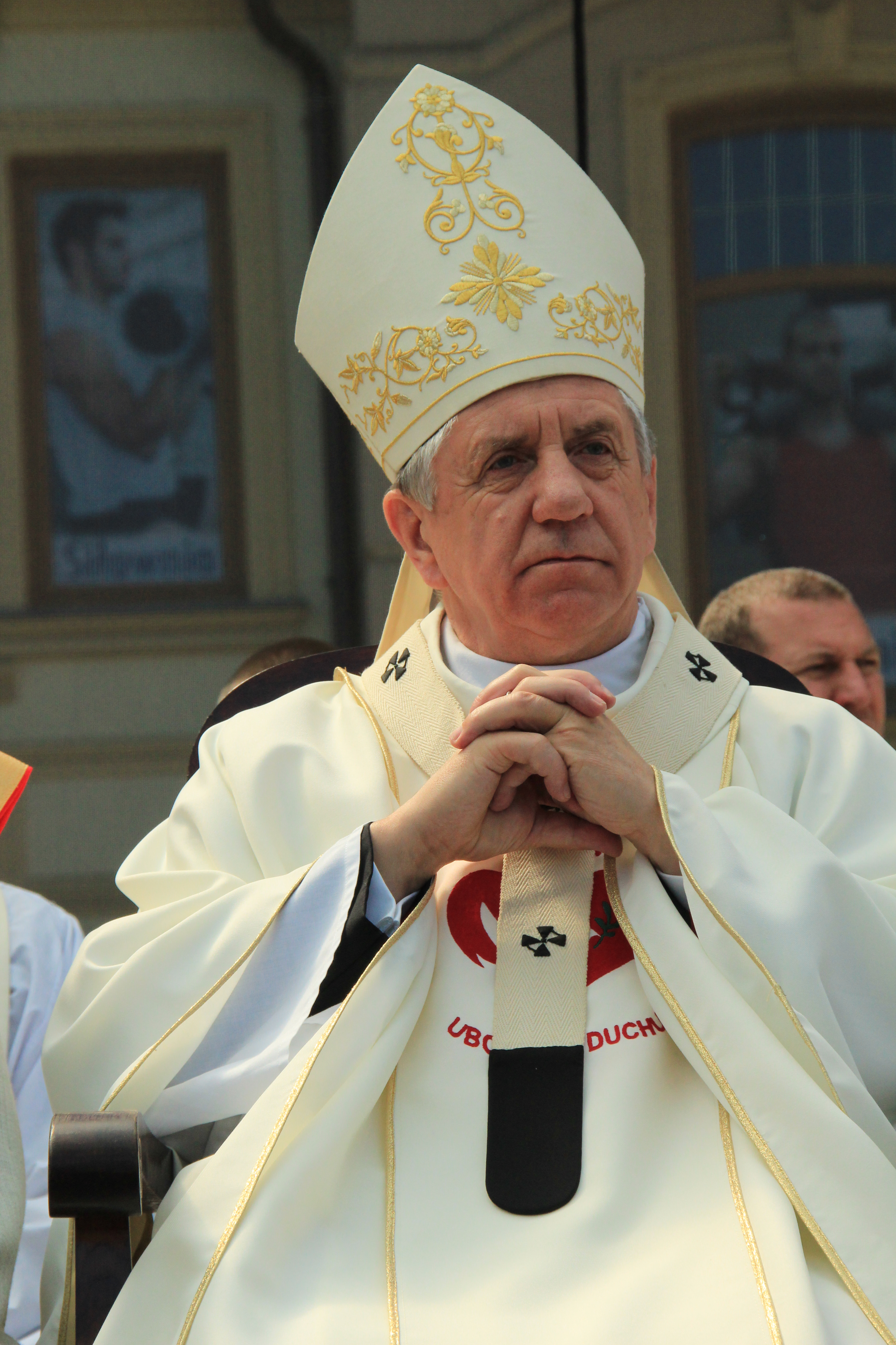 Arcybiskup Andrzej Dzięga w czasie Mszy Świętej kończącej Archidiecezjalne Dni Młodych w Barlinku w 2014 roku.